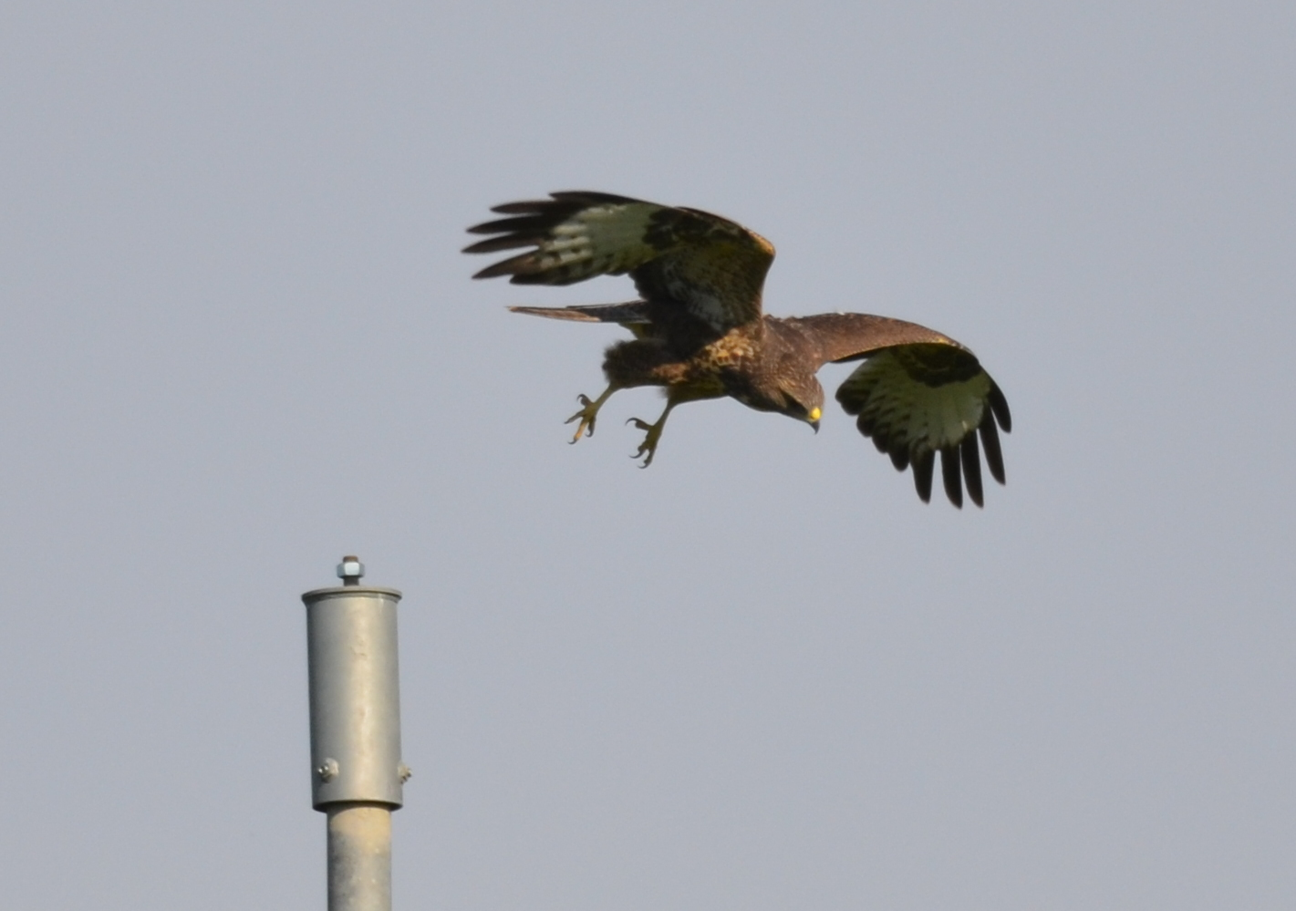 Eurasian Common Buzzard (Buteo buteo)